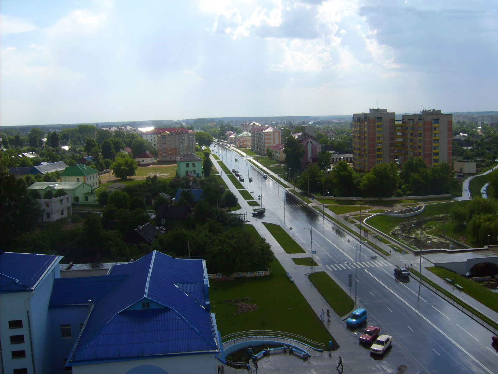 Ивацевичи